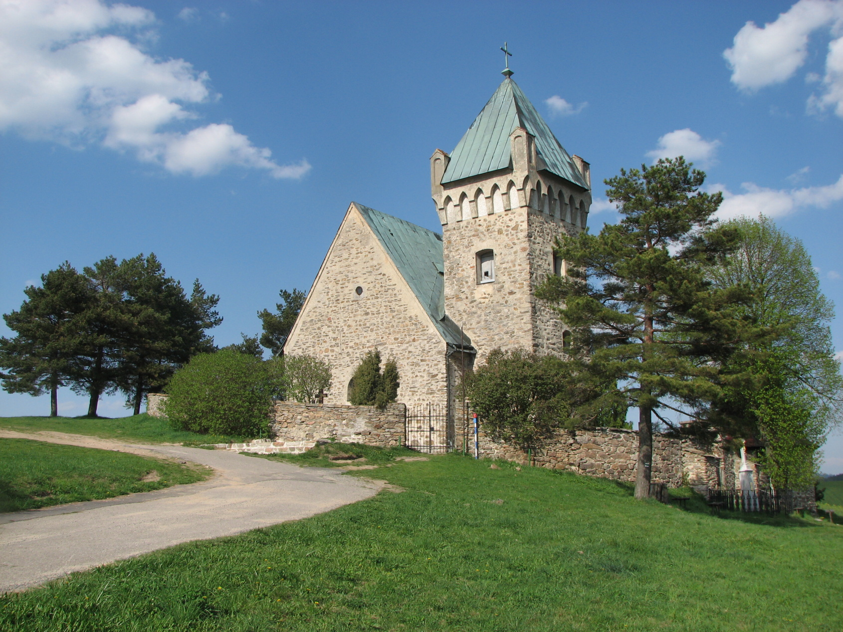 Kostel sv. Michala (Vítochov), SZ od středu obce, Vítochov